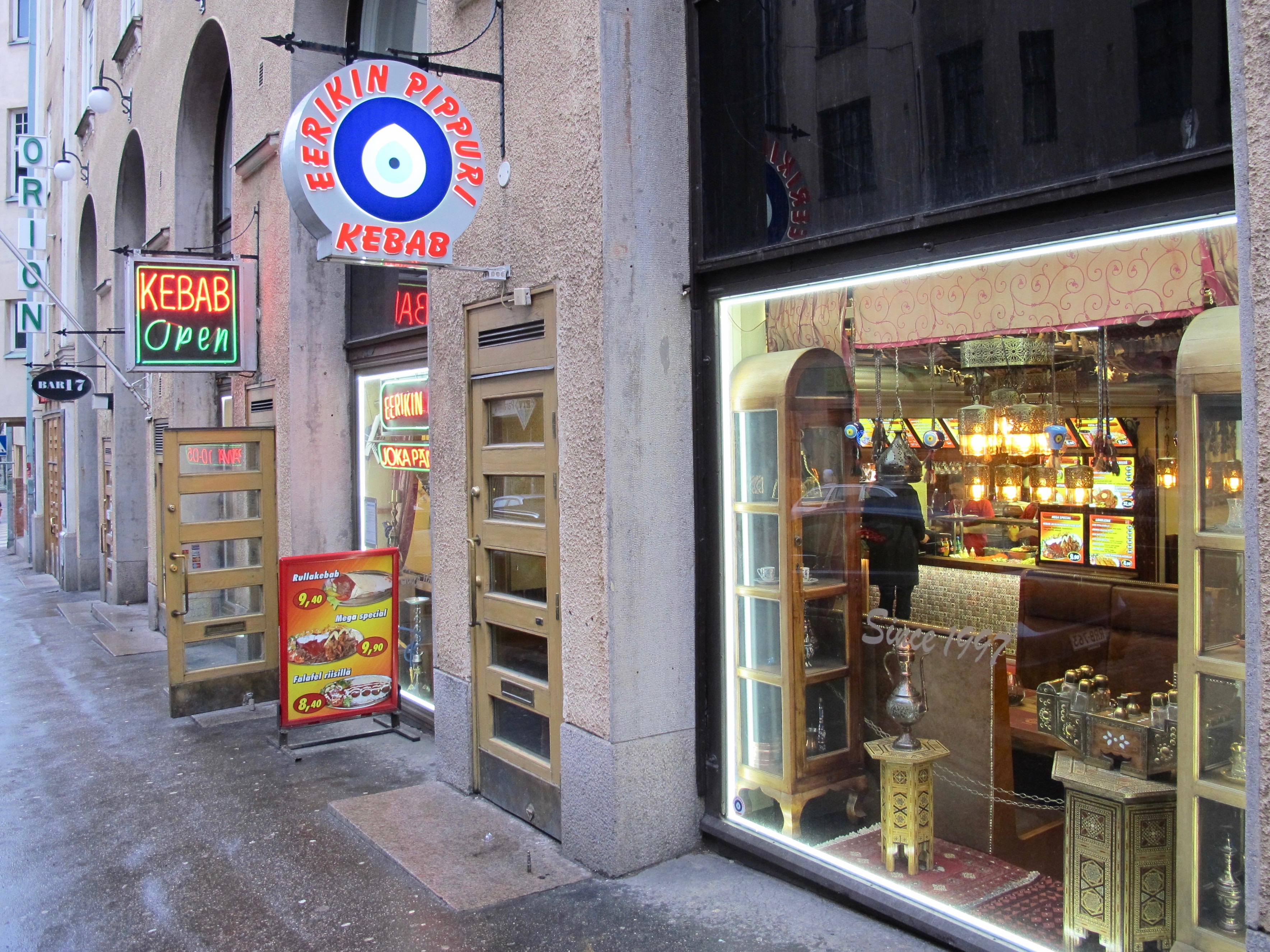 Kebab-ravintola Eerikin Pippuri Eerikinkadulla, Helsingissä 27. tammikuuta 2018.